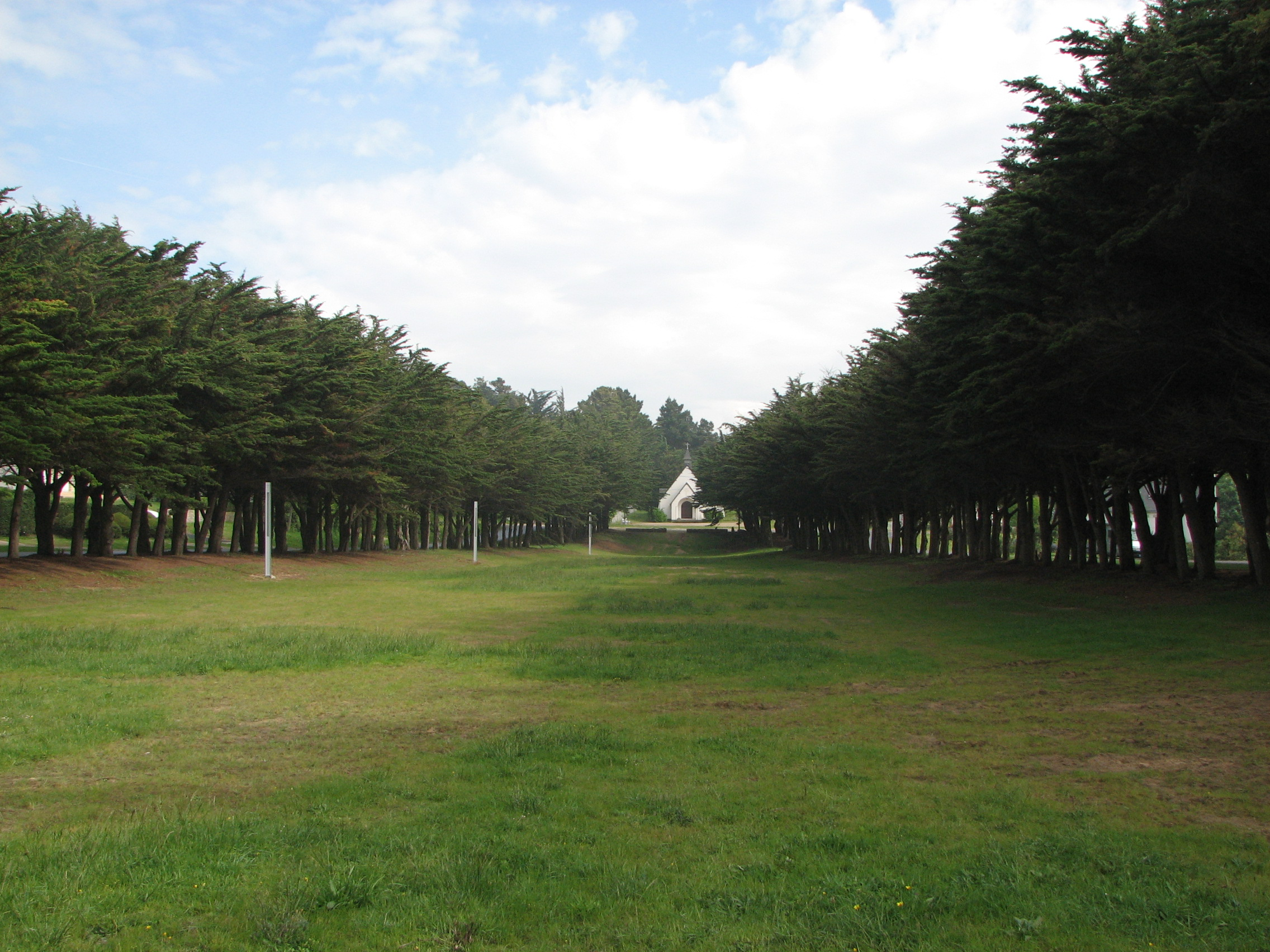 Chapelle aux Sables-d'or-les-pins avec Cupressus macrocarpa